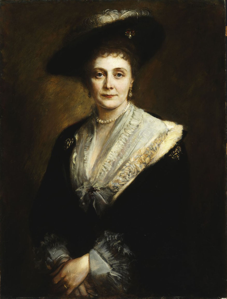 Kendeffy Katinka, Andrássy Gyula gróf felesége